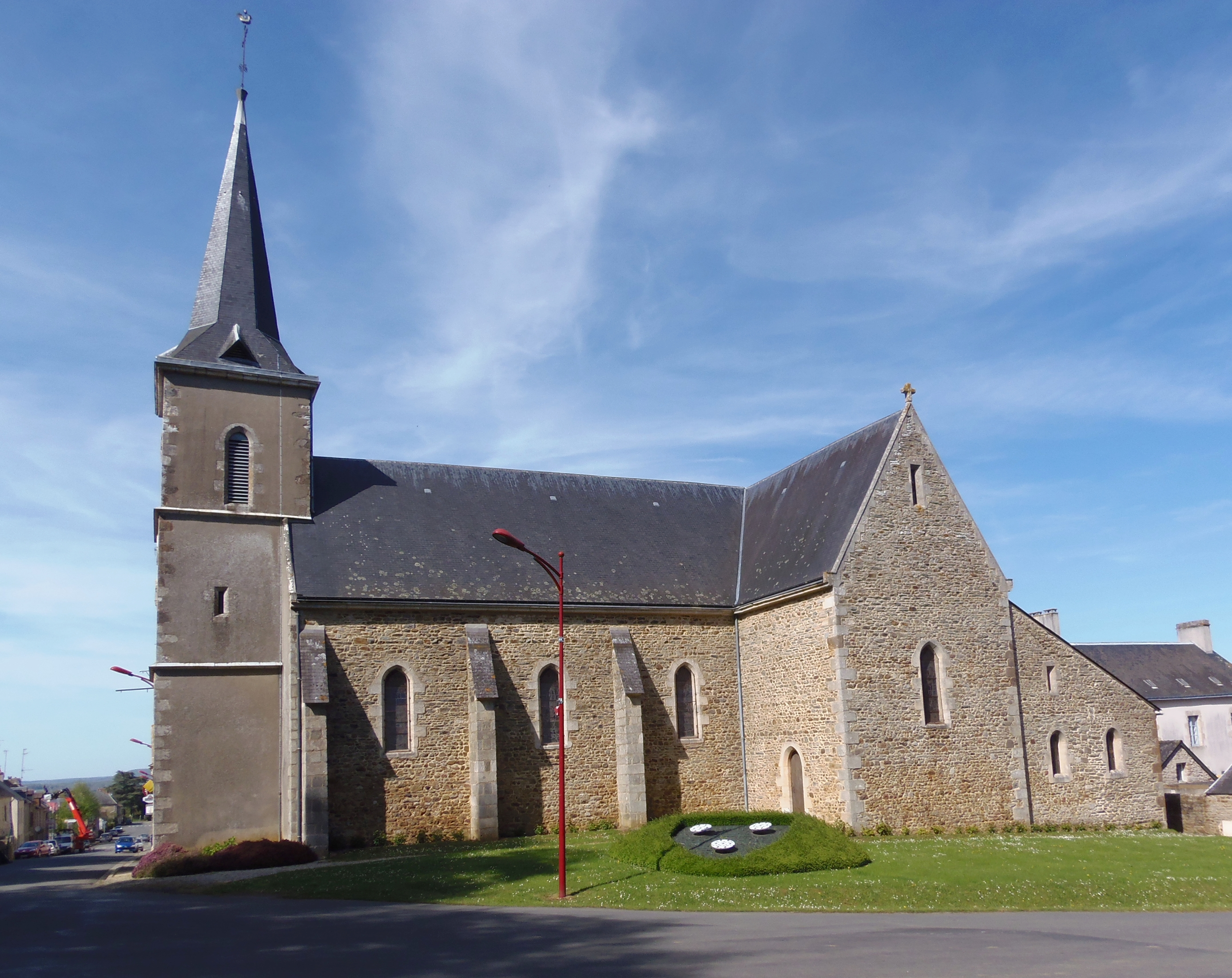 Moulins-le-Carbonel (Pays de la Loire, France). L'église Saint-Symphorien.